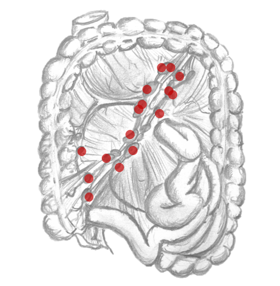 Português do Brasil: Modelo de linfonodos mesentéricos infectados